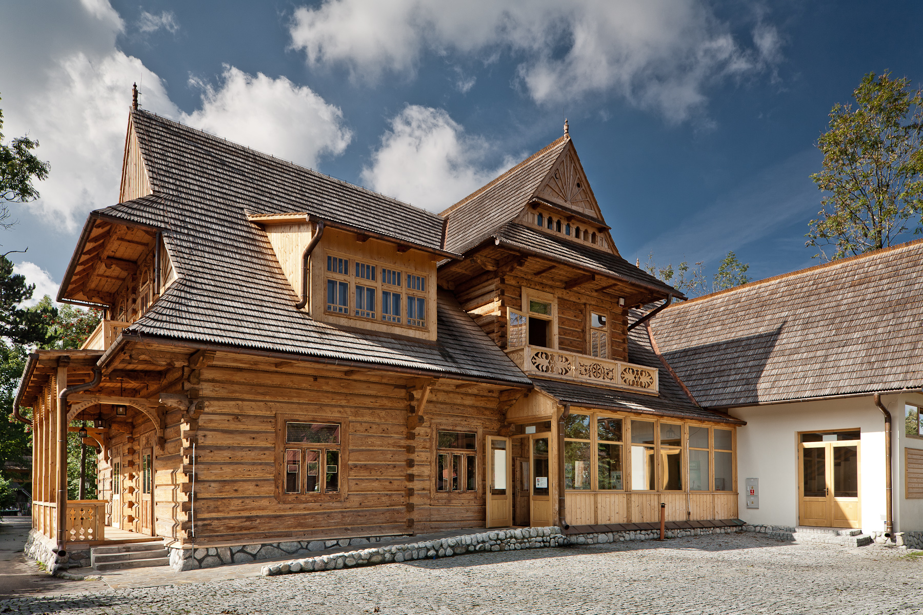 Willa „Oksza”, Zakopane - widok na tylną elewacje